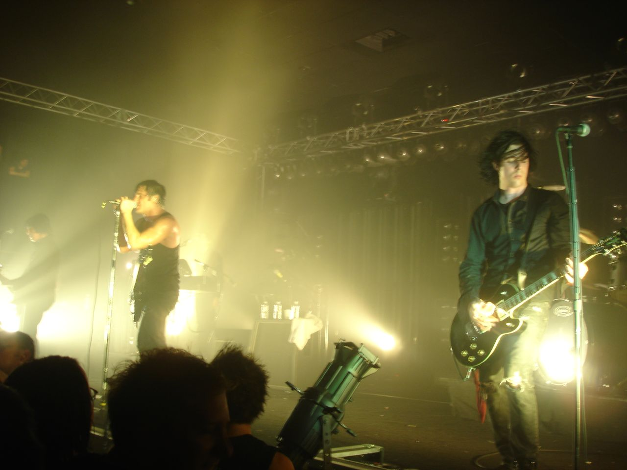 Nine Inch NailsDSC03384